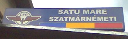 Satu-Mare, Szatmárnémeti, Sathmar (Transylvania, Ro)